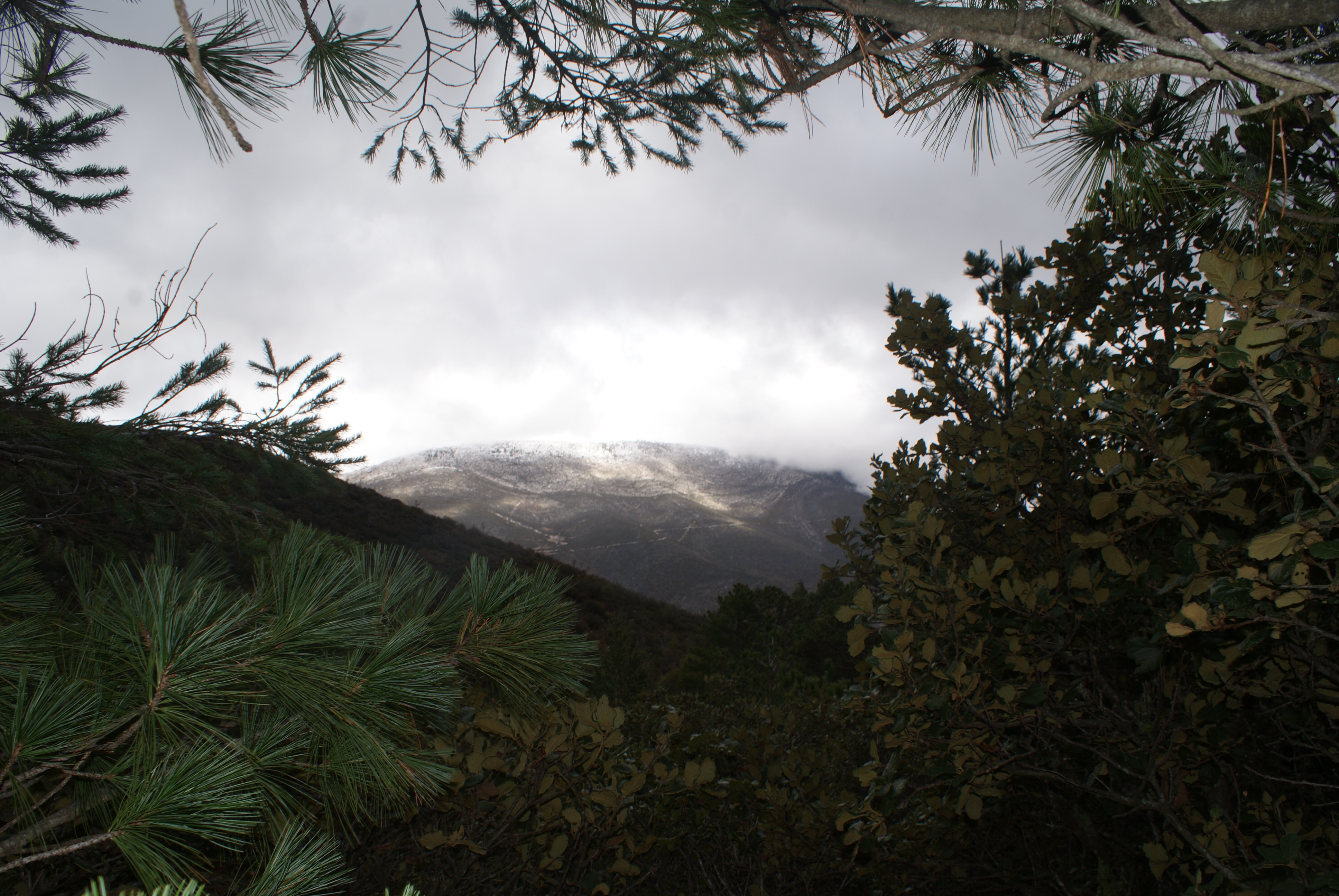 Los Oyameles, Arteaga, Coahuila